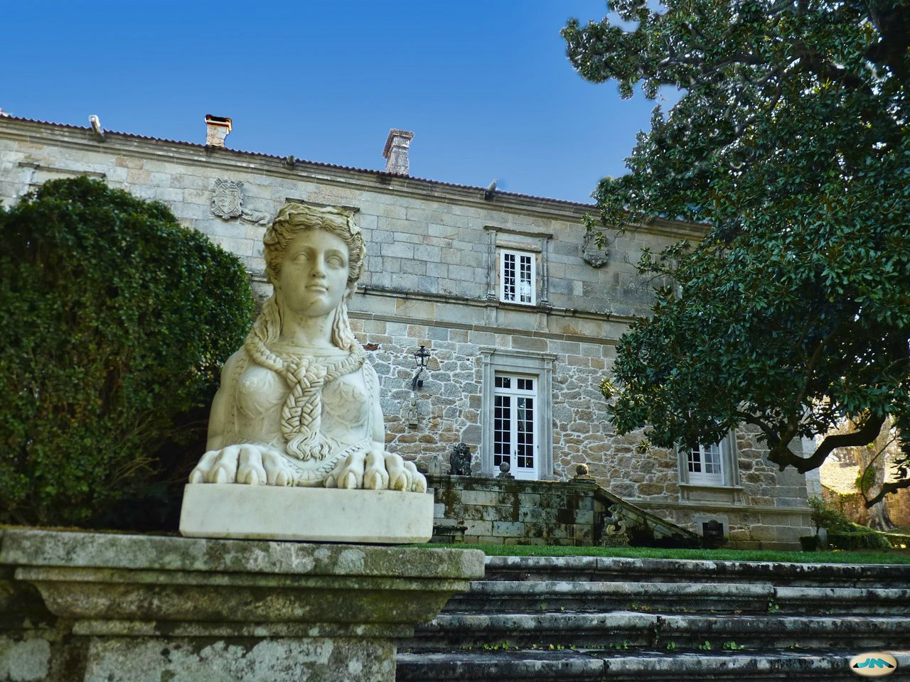 Vilagarcía de Arousa-Pazo de Rubians-Entrada1